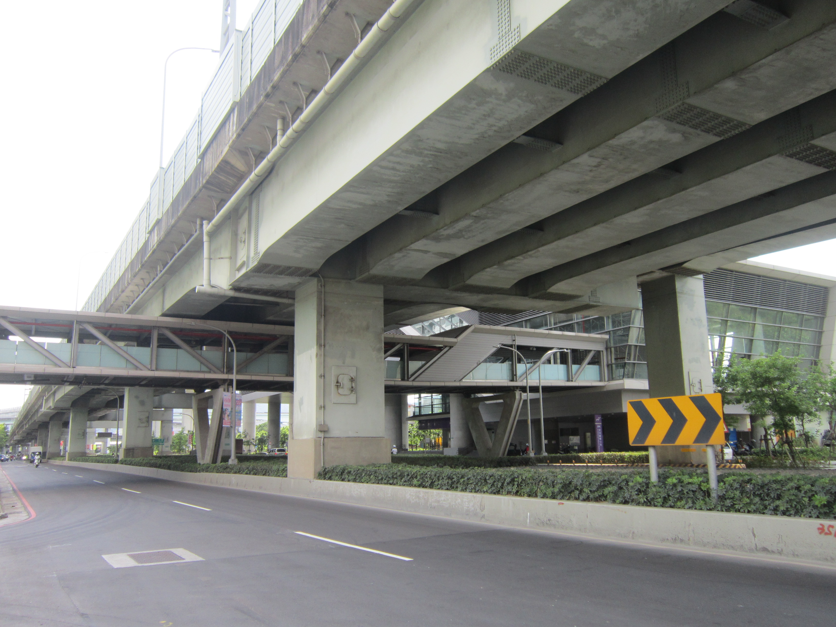 桃園國際機場捷運新莊副都心站人行天橋。